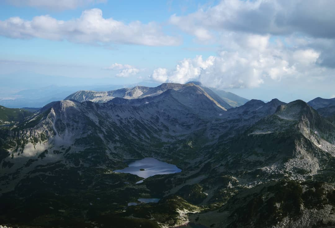 Пирин, Пирин